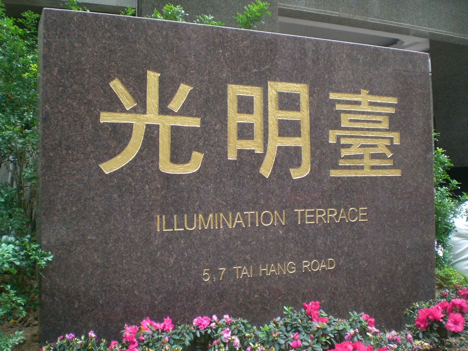 大坑道5-7號光明臺, No.5-7 Tai Hang Road, Hong Kong